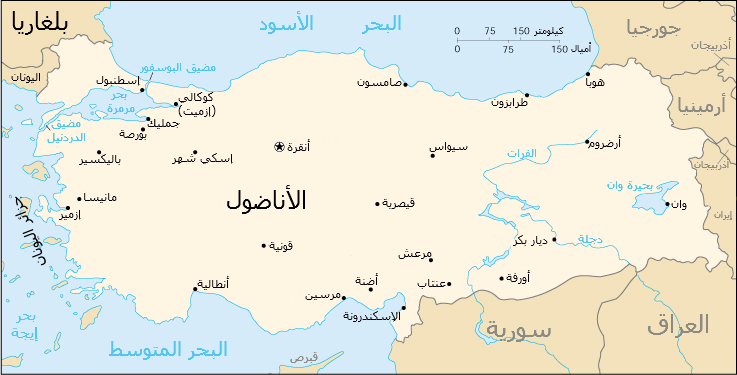 منقولة من خريطة: map of Turkey على ويكيبيديا الإنجليزية،أنشات بناءً على معلومات من كتاب الحقائق التابع لوكالة الاستخبارات المركزية الأمريكية